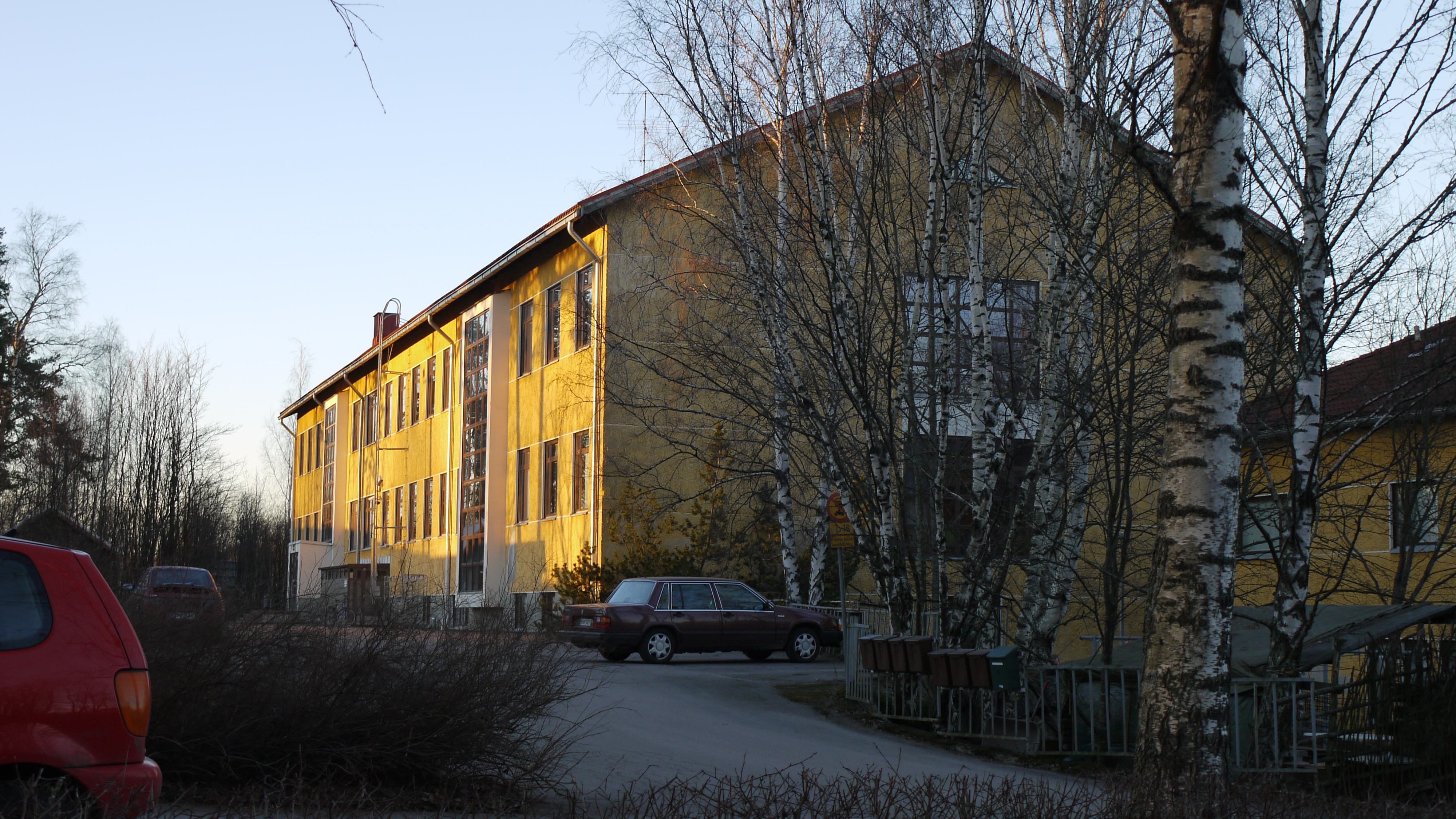 Niittykummun koulun takajulkisivu